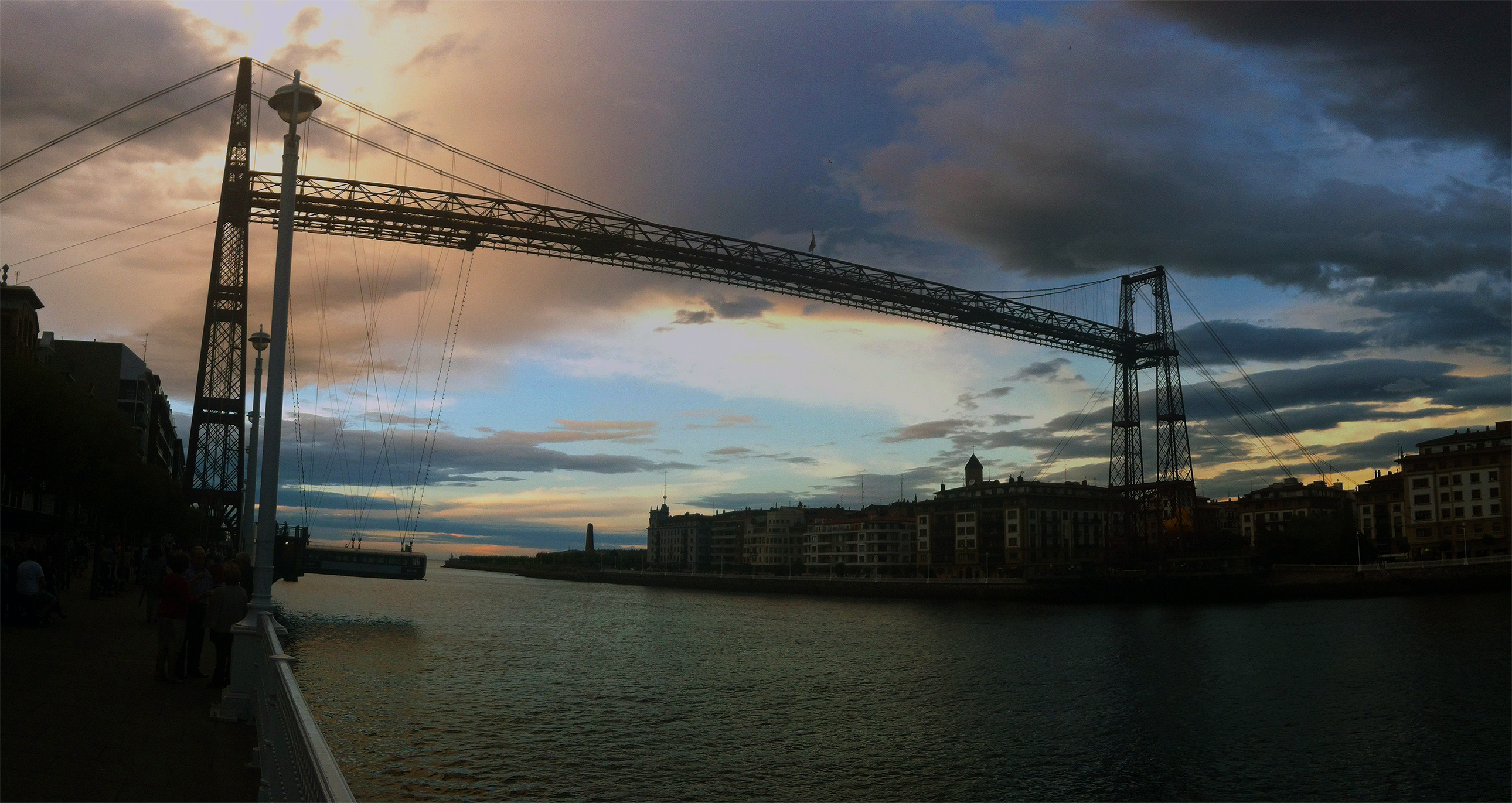 Puente de Vizcaya